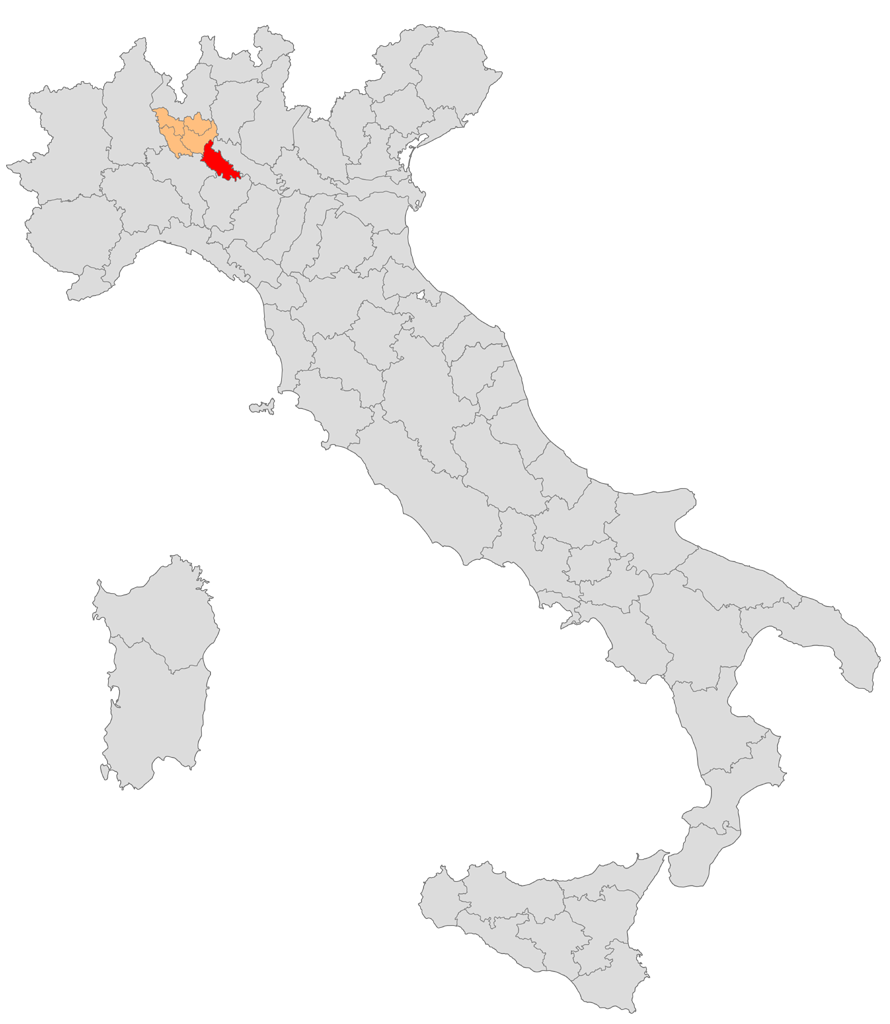 Mappa del circondario di Lodi nella provincia di Milano (1859-1926)